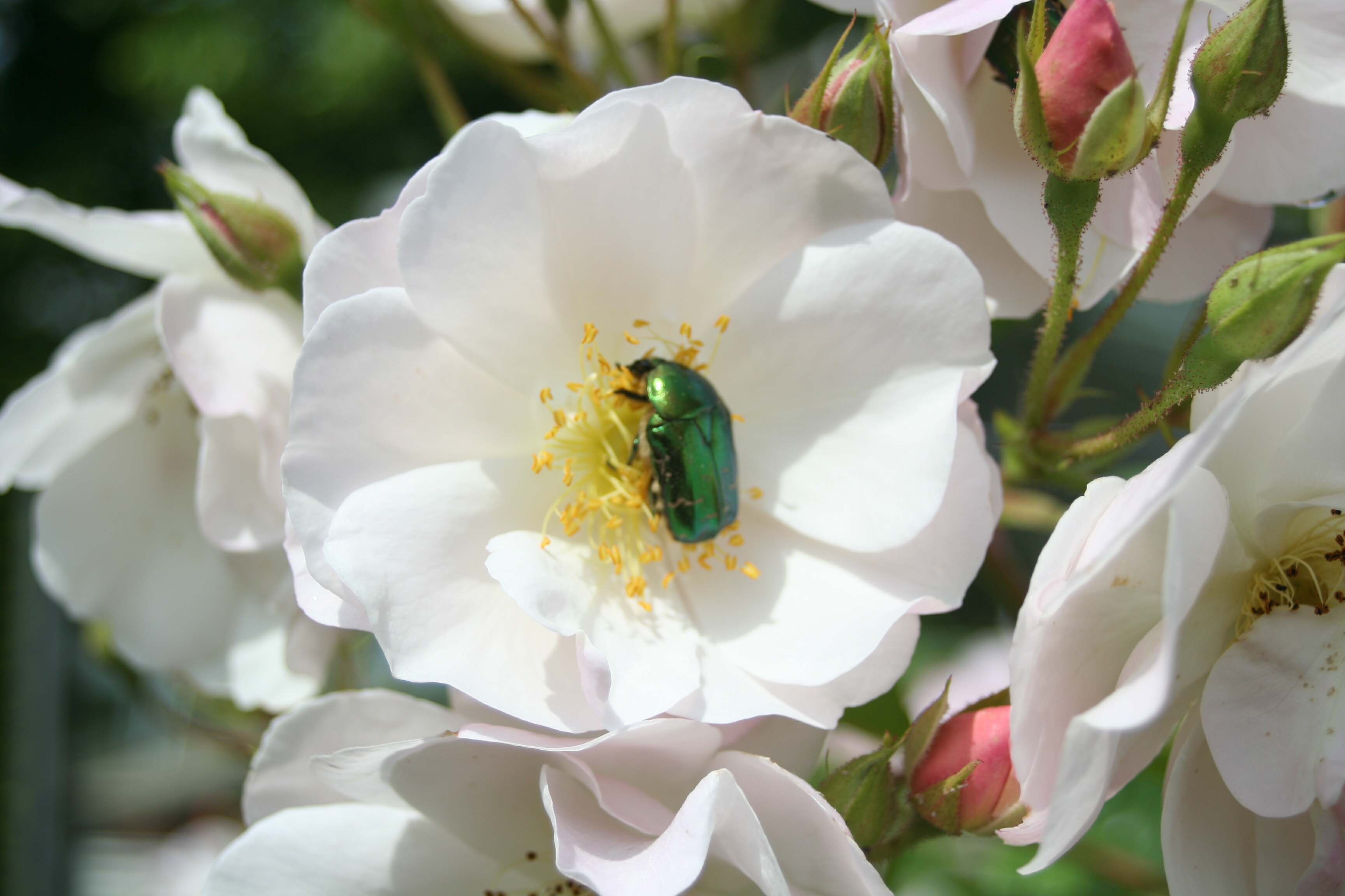 Rosa 'Nevada', de mon jardin à Épône (France)